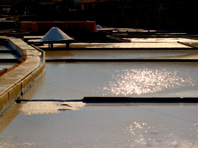 Rio Maior [P], 2011, Salinas Naturais.